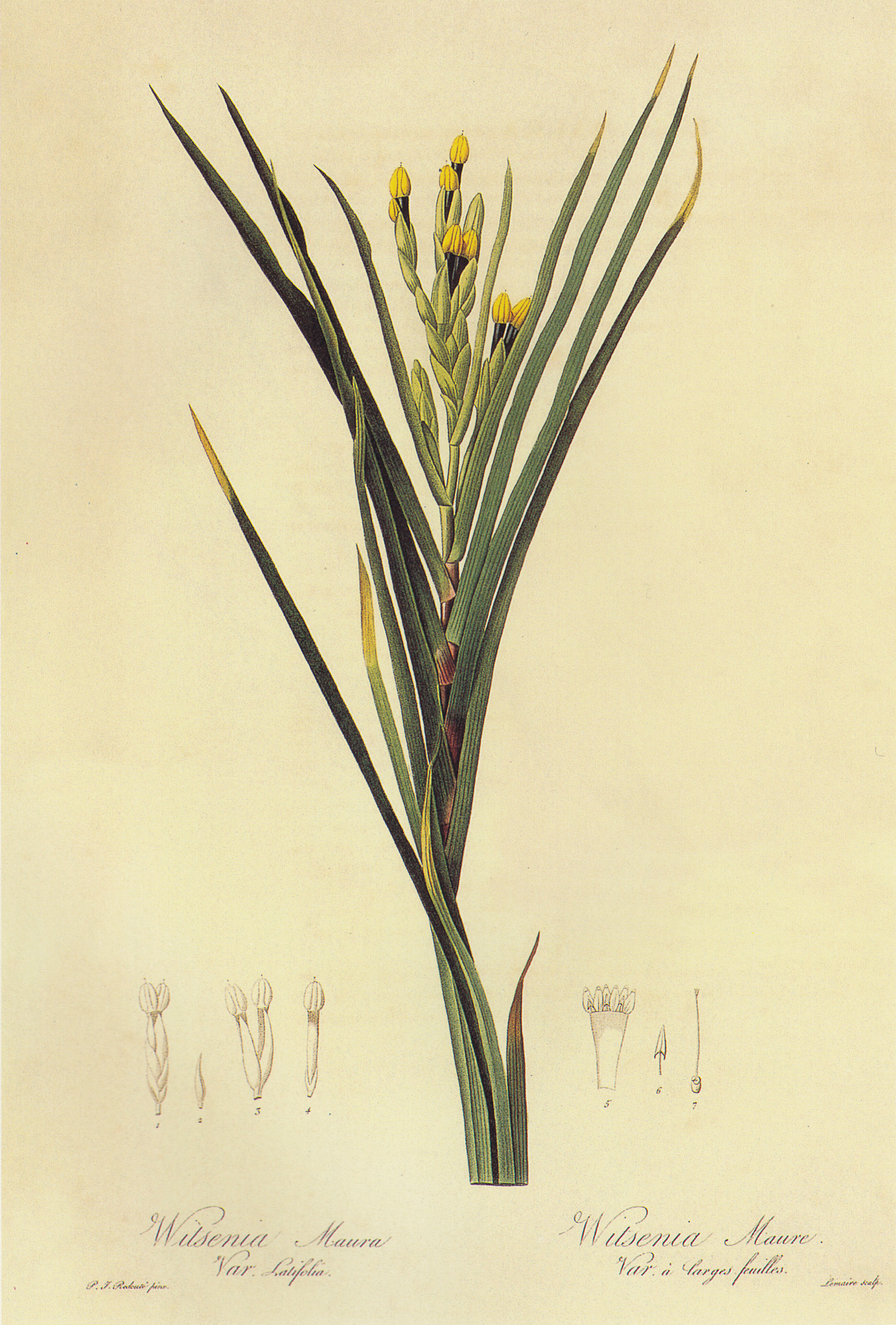 维森花。原产于南非。